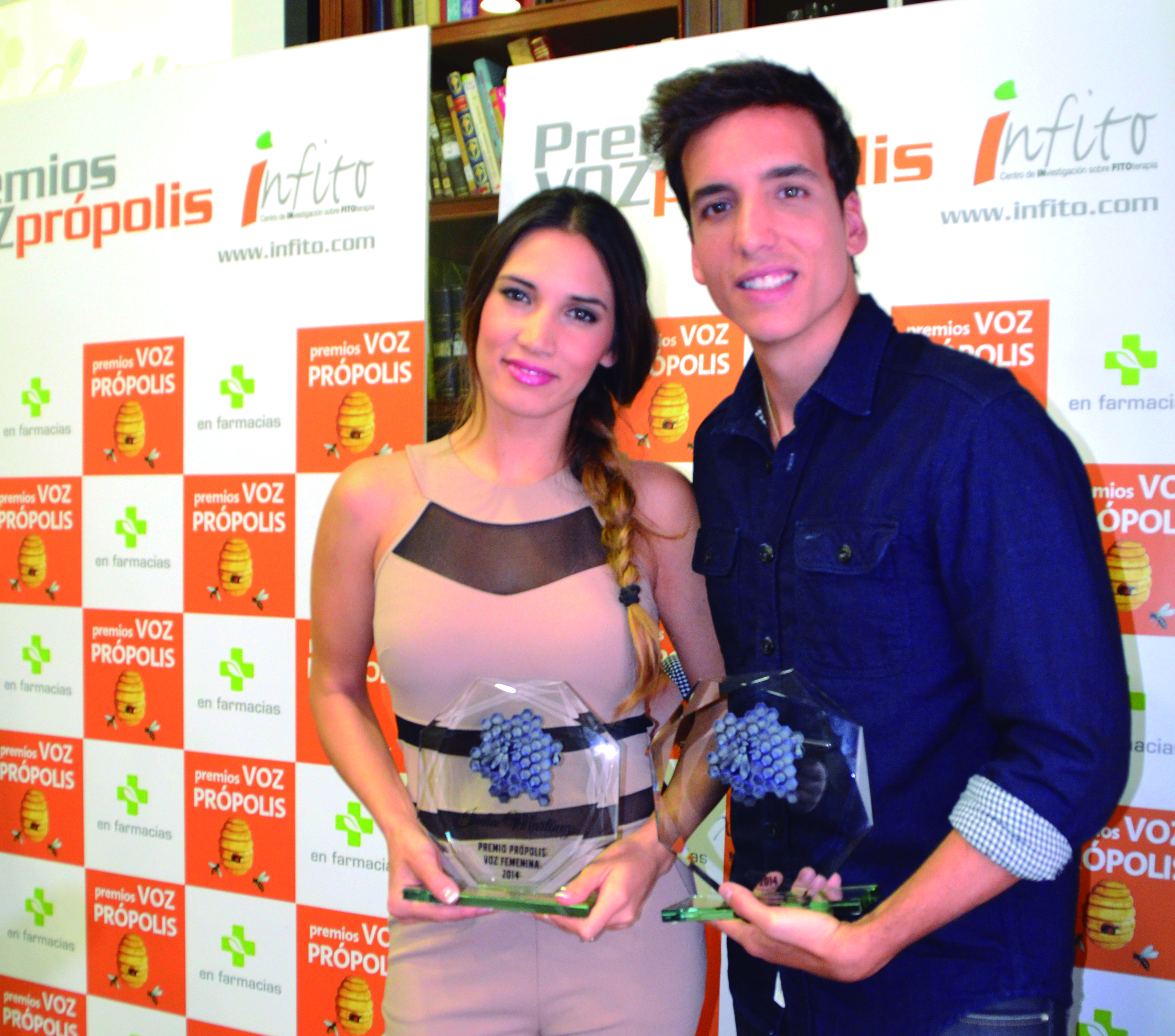 India Martínez y Xuso Jones en los Premios Própolis a las voces del año 2014.